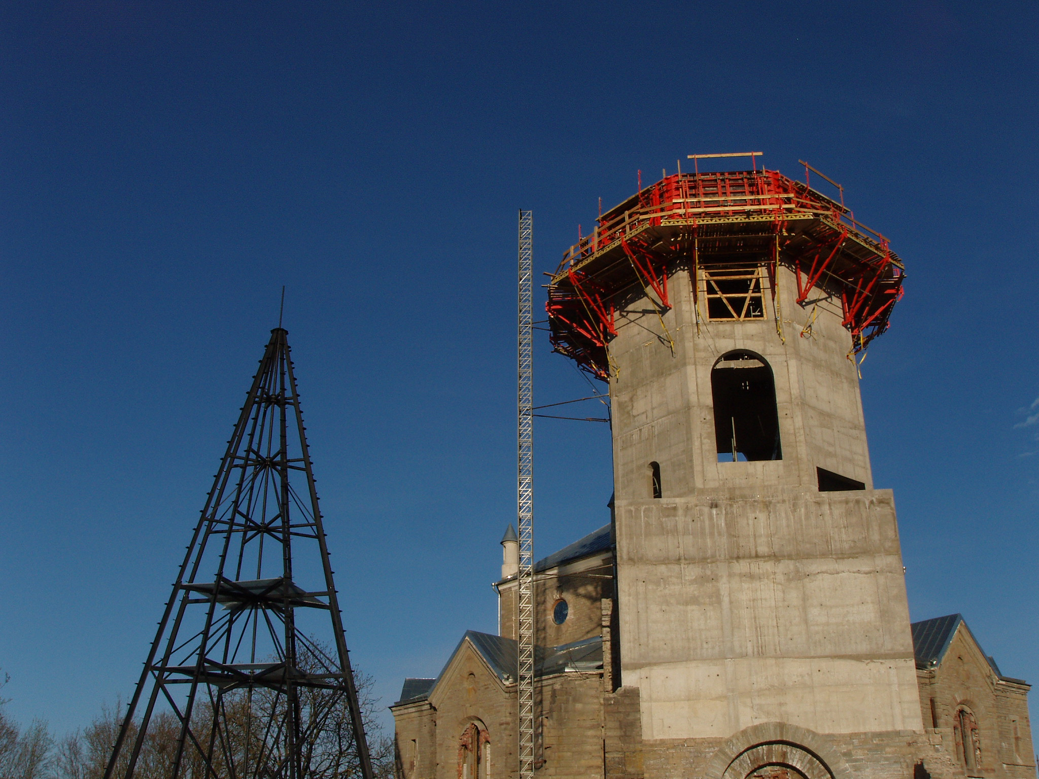 Narva Aleksandri Suurkirik